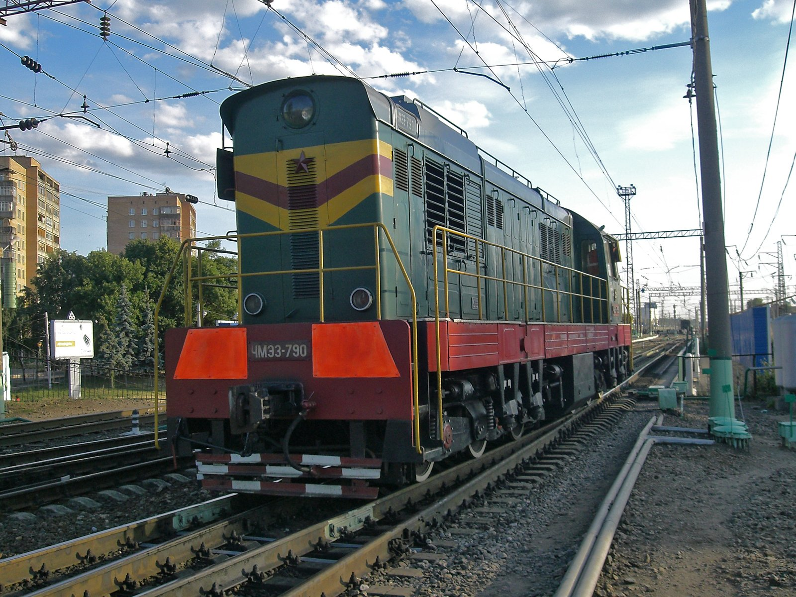 ЧМЭ3-790, ст.Рязань-2